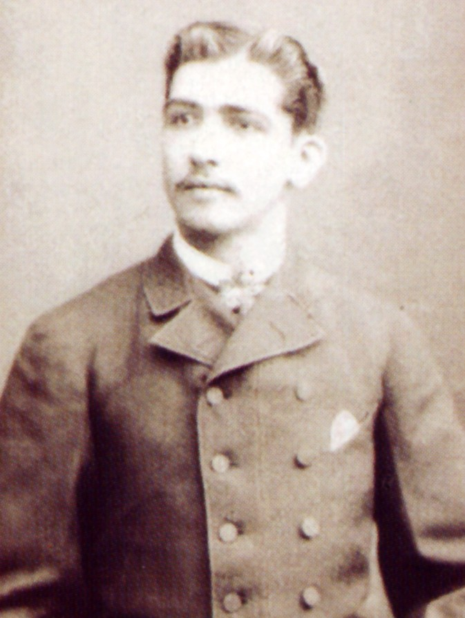 Juan B. Lepiani (1864-1933), pintor peruano.